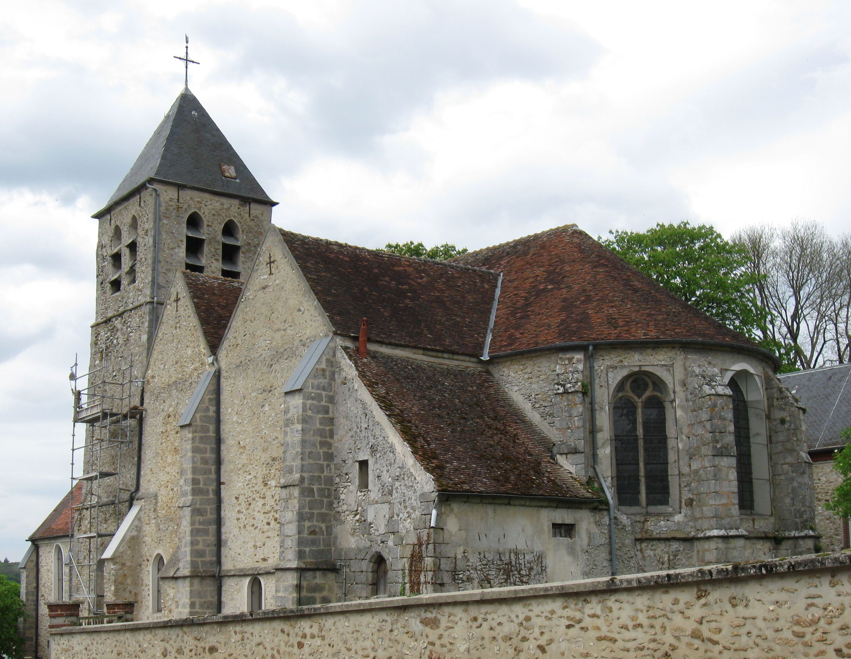 Église Saint-Martin de Dammartin-sur-Tigeaux. (Seine-et-Marne, région Île-de-France).